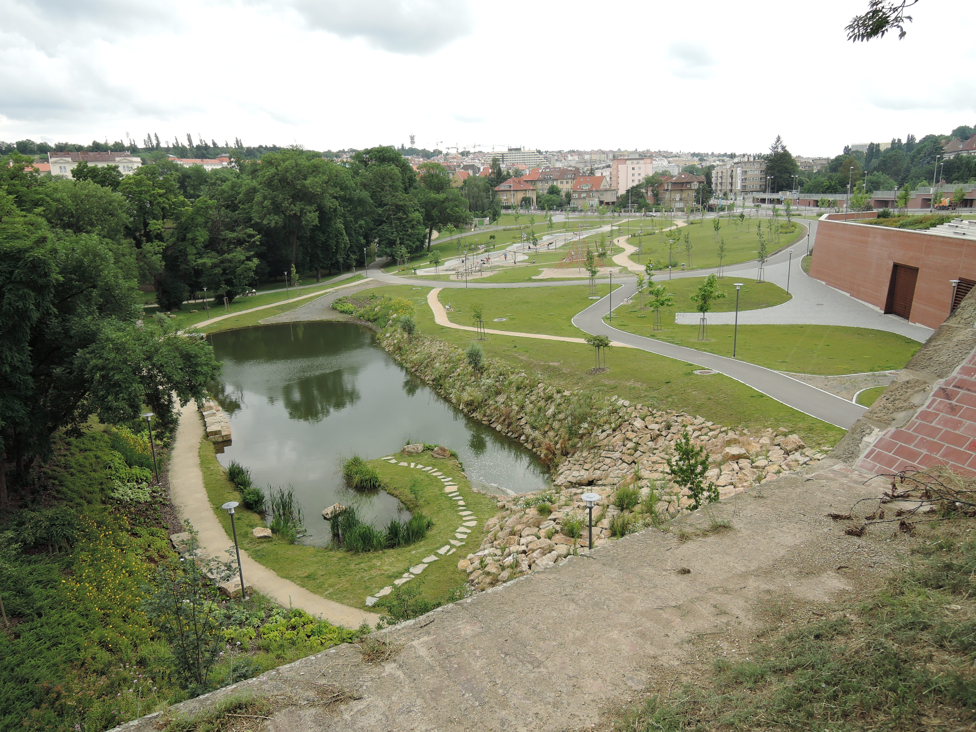 Praha, Střešovice, park Maxe van de Stoela